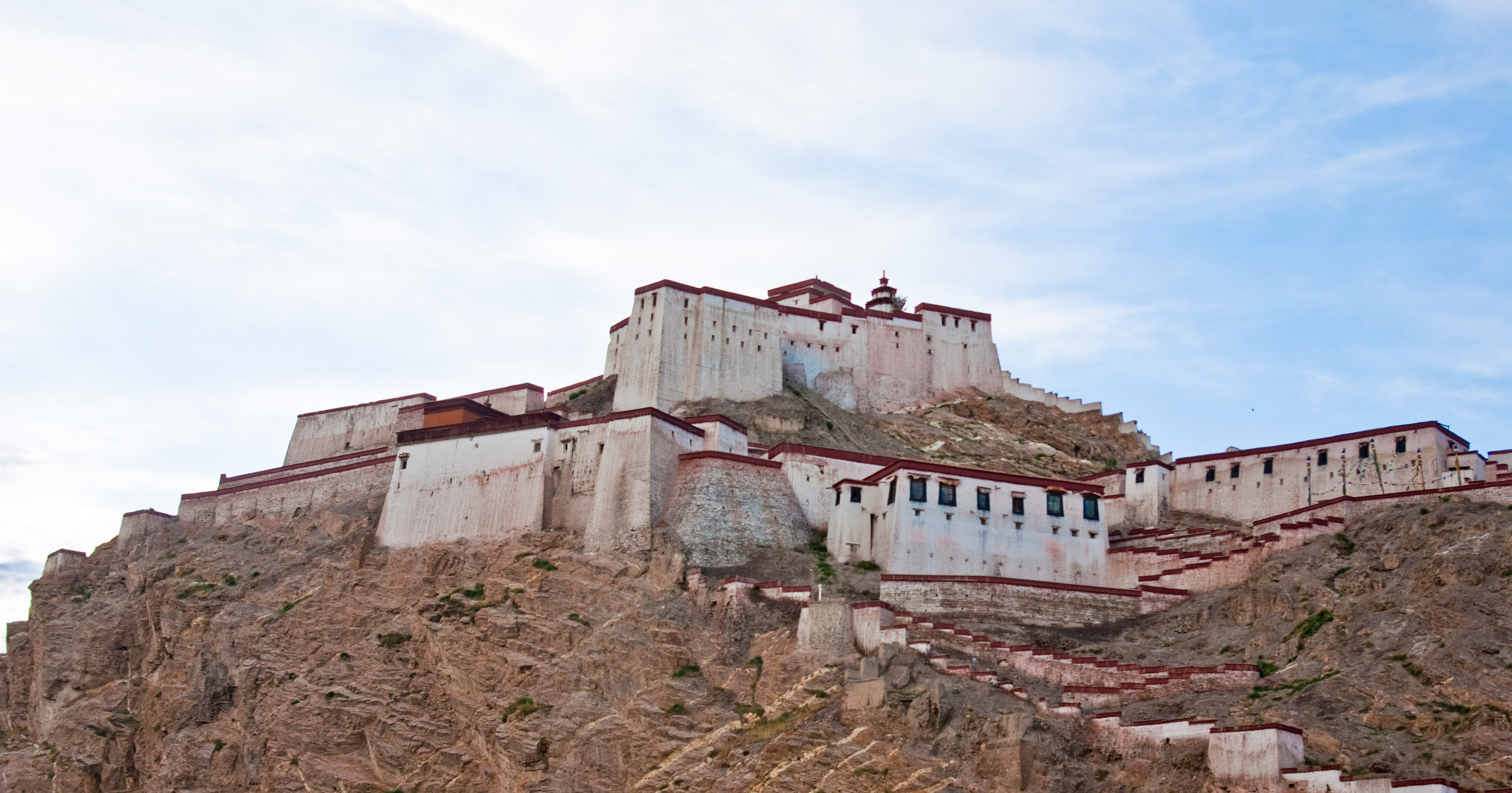 Gyantse Dzong